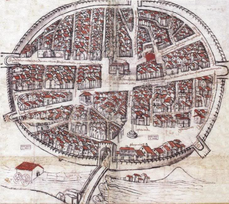 En 1503 se dibujó el plano de Aranda de Duero, en el que se aprecia claramente como se dividía la localidad en dos barrios, el judío y el cristiano.